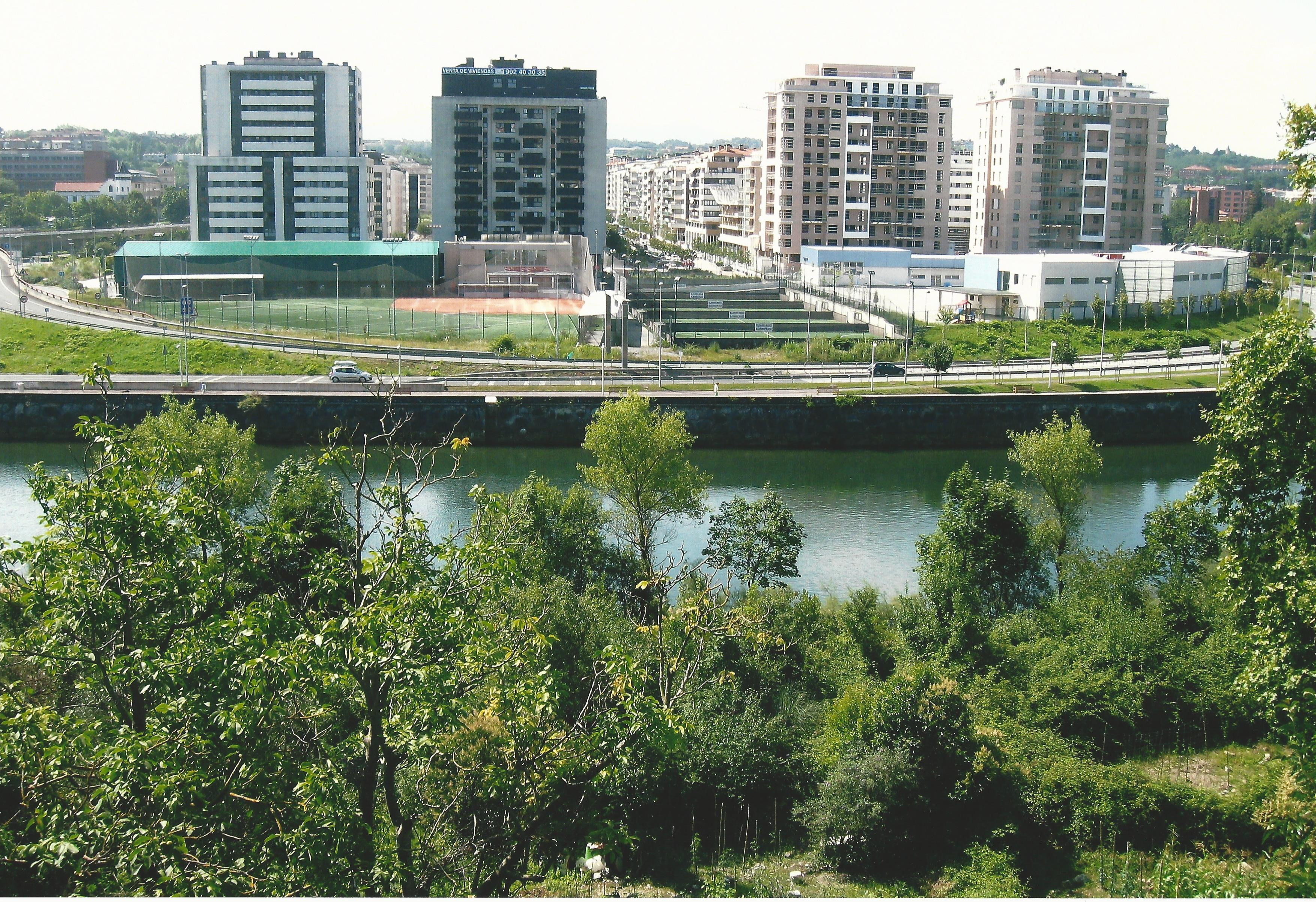 2015 Colección Amarauna Bilduma. -- Argazkilaria / Fotógrafo: Antonio Alonso Perez -- Informazio gehiago Amarako Ernest Lluch Kultur Etxeko Liburutegia / Más información: Biblioteca del Centro Cultural Ernest Lluch de Amara (Donostia / San Sebastián).-- R. zkia. 1127 Donostiako kaleak eta plazak: Loiolako Erriberak